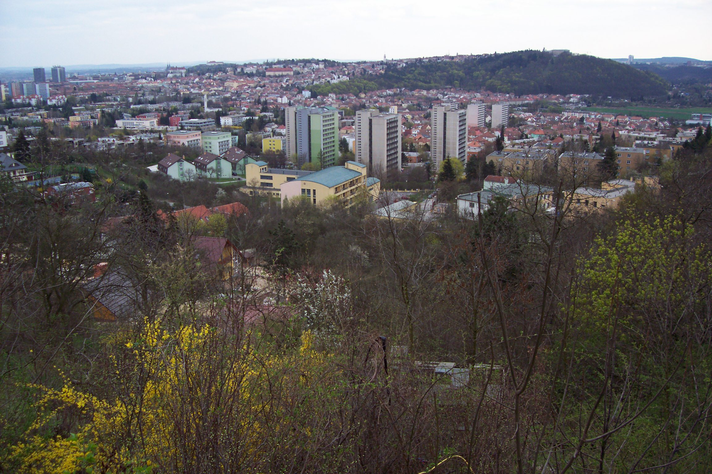 Global view on Brno-Žabovřesky city district Celkový pohled na brněnskou městskou část Brno-Žabovřesky. Pořízeno z parcely 5521/2 v katastrálním území Žabovřesky.